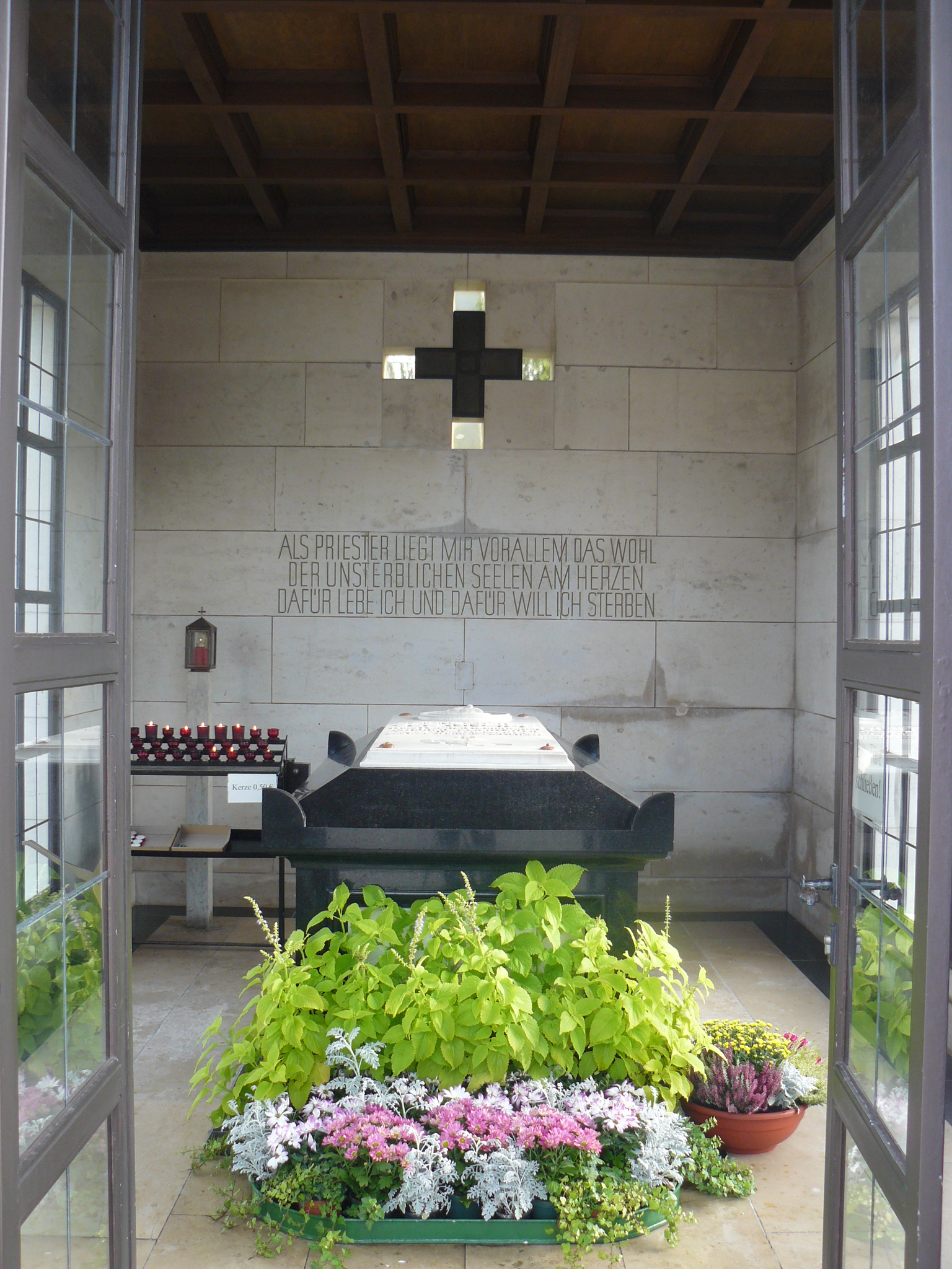 D-7-78-116-18 Kneipp-Mausoleum, Innenansicht, St.-Anna-Str. 6, Bad WoerishofenThis is a photograph of an architectural monument.